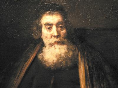 Rembrandtův portrét zřejmě Jana Amose Komenského, dnes ve sbírkách Galerie Uffizi